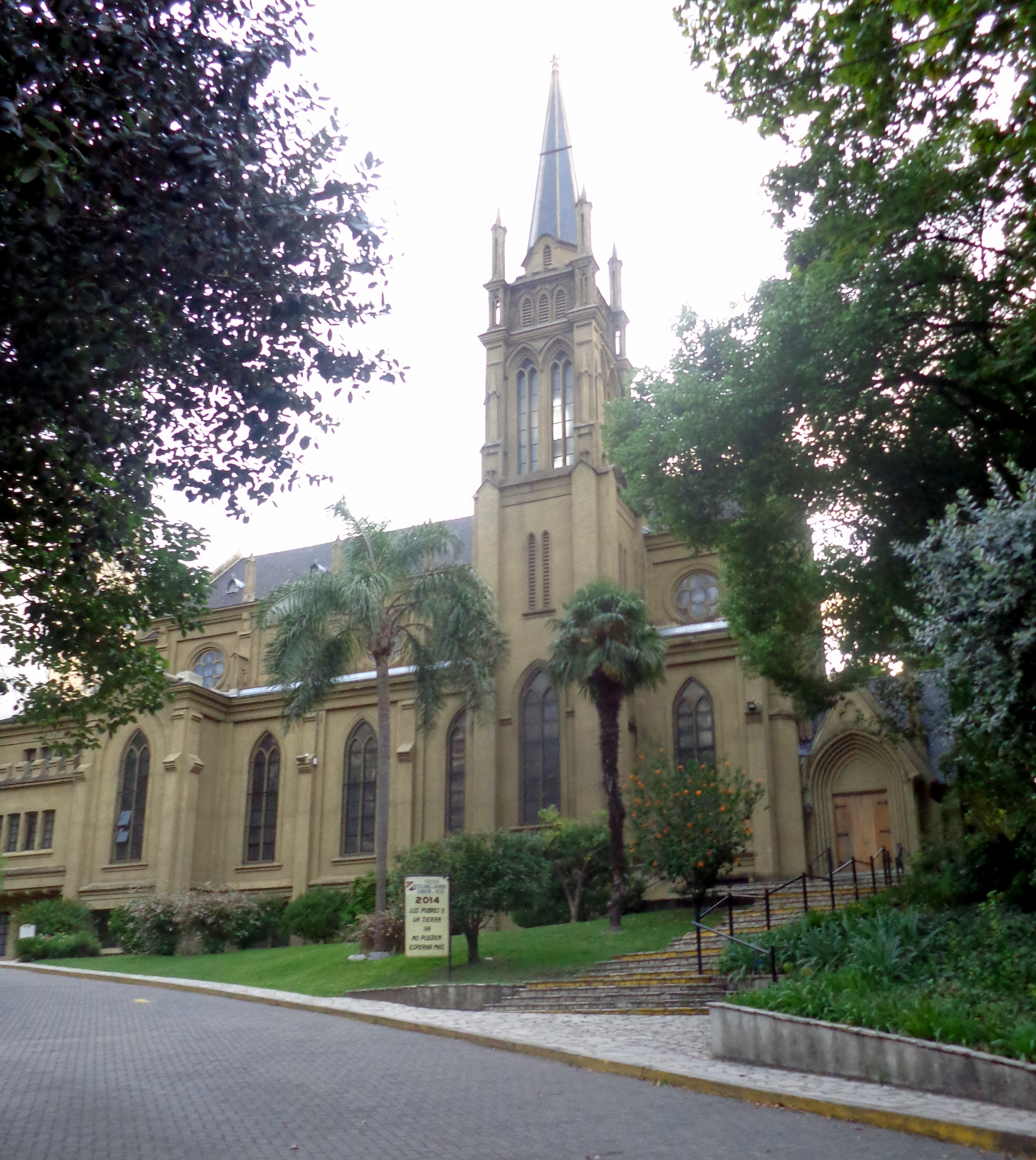 Colegio Esclavas del Sagrado Corazon de Jesús. Obra del arquitecto Luis J. Fourcade, constuida entre 1929 y 1934. Av. Luis María Campos 898, Buenos Aires, Argentina.